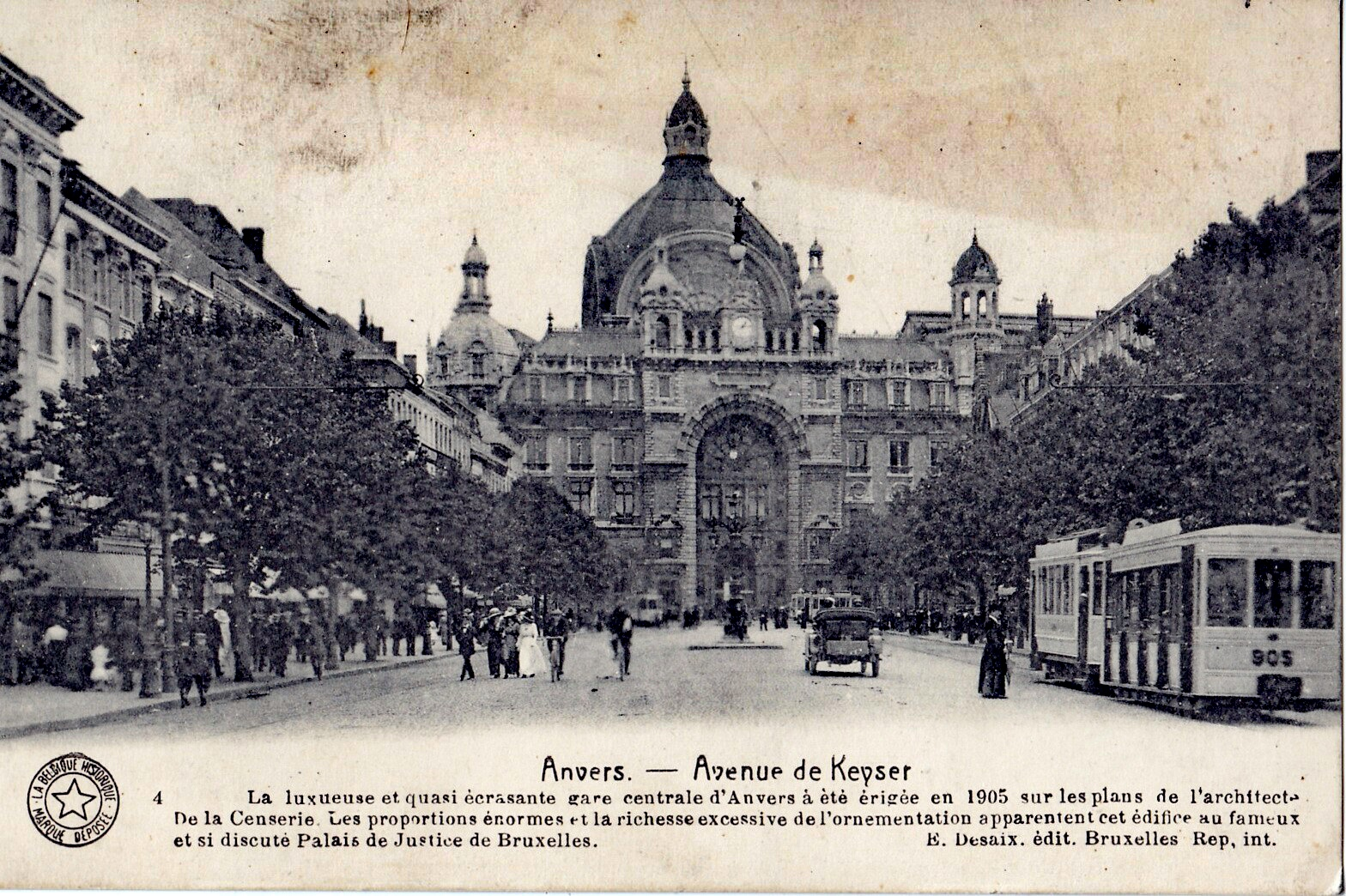 Carte postale ancienne éditée par E. Desaix à Bruxelles, collection La Belgique historique, n°4 :ANVERS - Avenue de Keyzer.La luxueuse et quasi-écrasante Gare centrale d'Anvers a été érigée en 1905 sur les plans de l'architecte De la Censerie. Les proportions énormes et la richesse excessive de l'ornementation apparentent cet édifice au fameux et si discuté Palais de Justice de Bruxelles